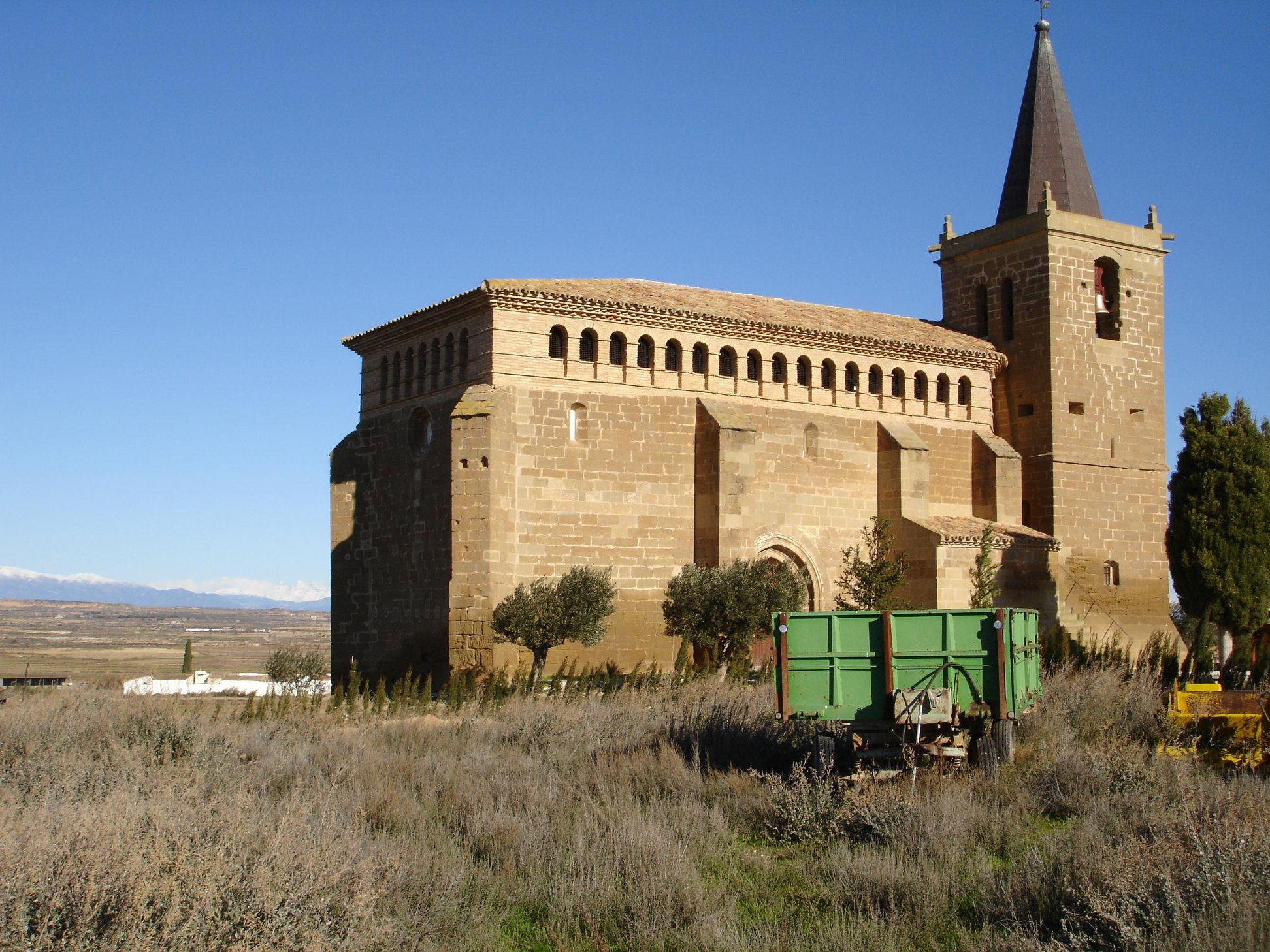 Vista de l'església de Sant Joan Baptista de Capdesaso amb el Mont Perdut a l'horitzó